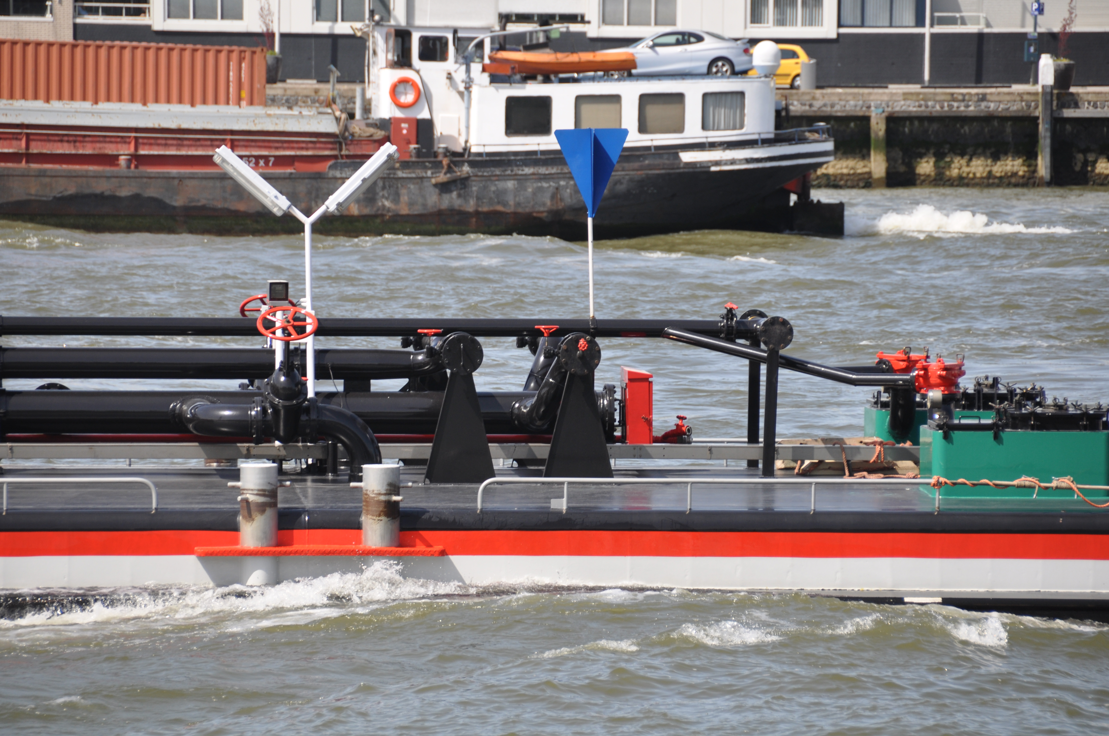 De WAALSTROOM in de opvaart op de Nieuwe Maas voor Rotterdam.